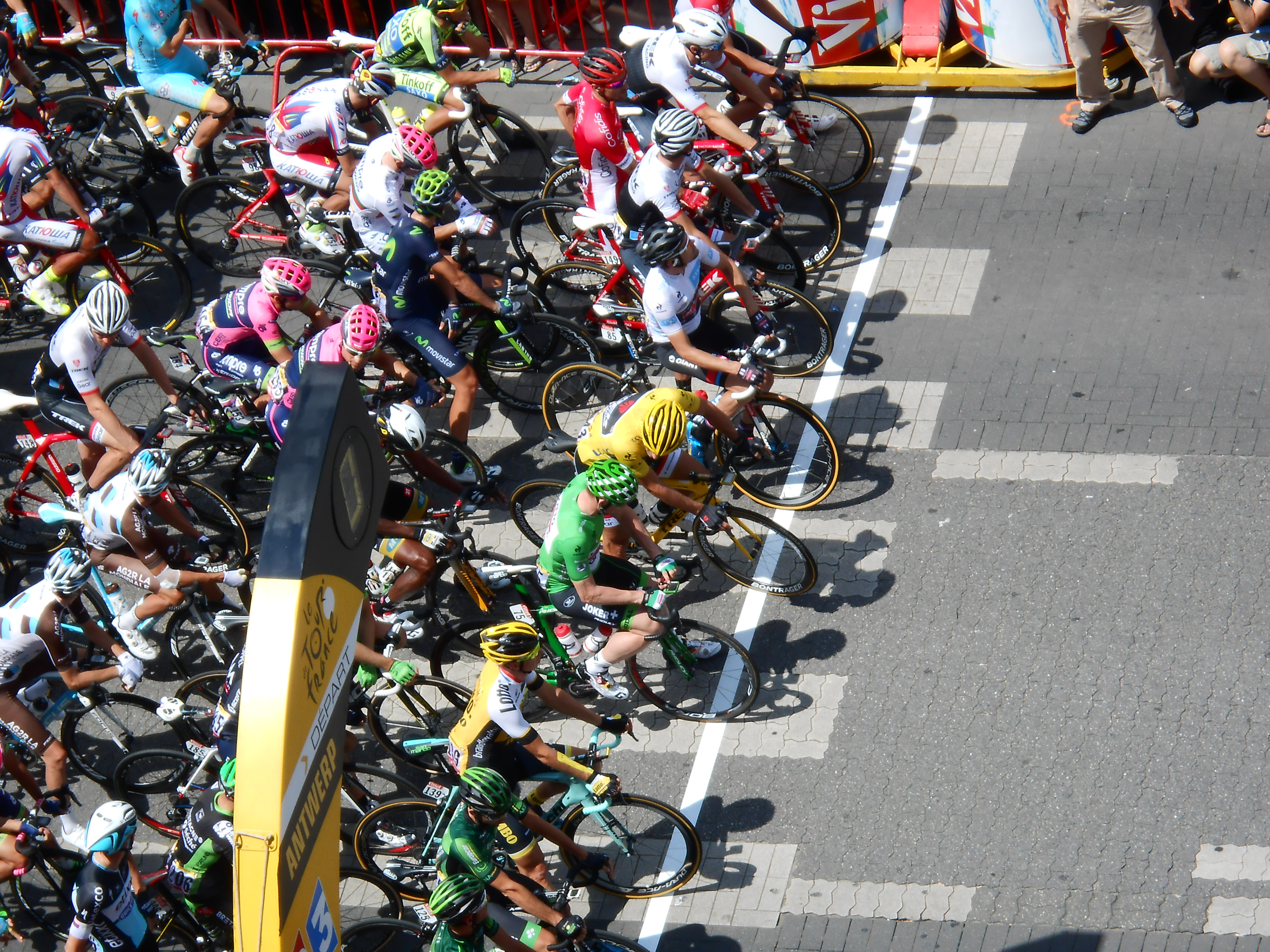 Départ 3e étape at Steen, Anvers (Antwerp)